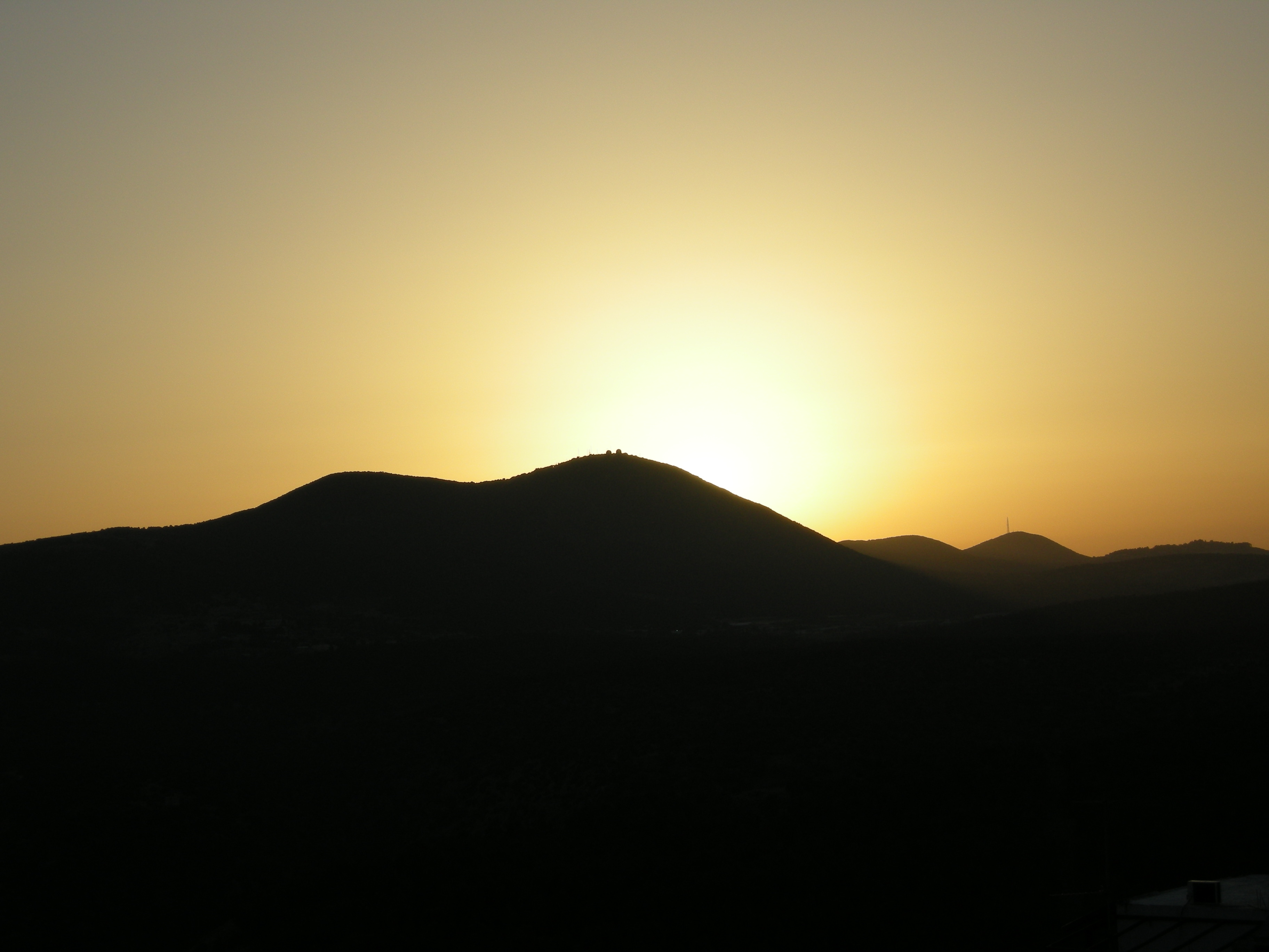 Safed